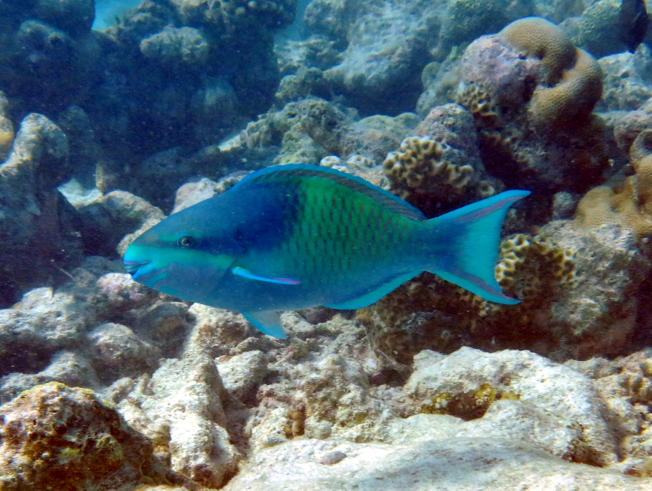 Un poisson-perroquet à capuchon sombre (Scarus scaber) aux Maldives (Landaagiraavaru, atoll de Baa).